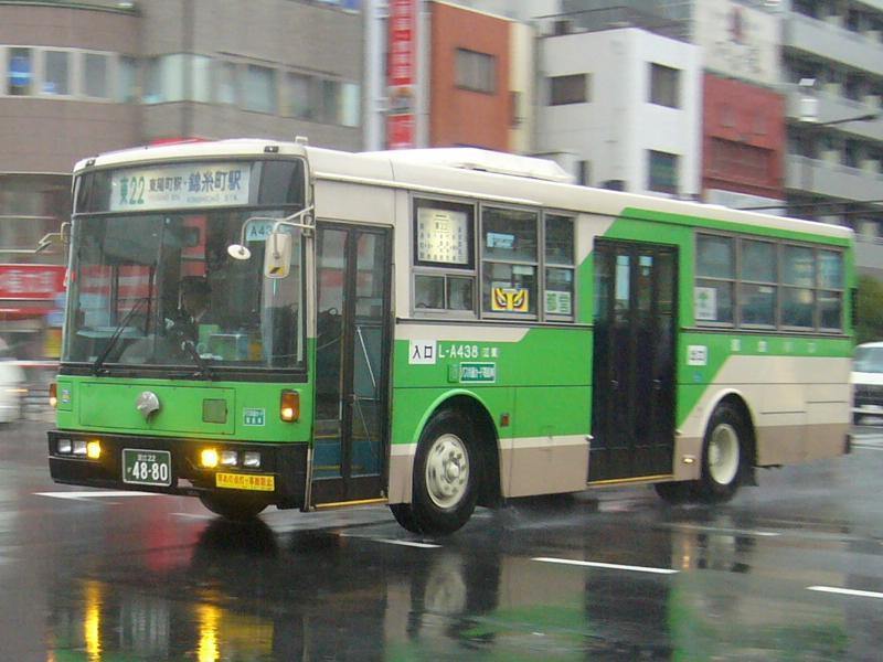 登録番号：足立22か48-80 都営バス(Toei bus)江東営業所所属 car.no L-A438 日産ディーゼル・スペースランナー U-UA440HSN 現在は廃車